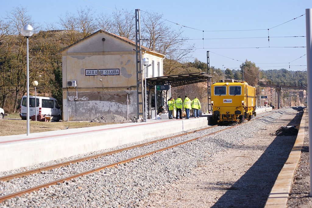 Estacionada a l'estació d'Aguilar de Segarra es trobava l'estabilitzadora de Copasa.